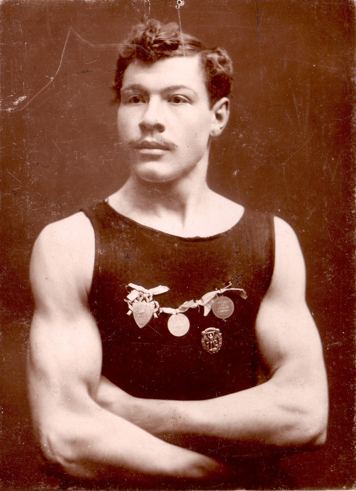 Maadleja August Kanastik (1882–1945)